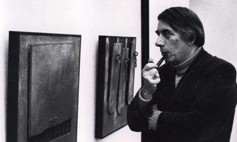 Ferruccio Bortoluzzi